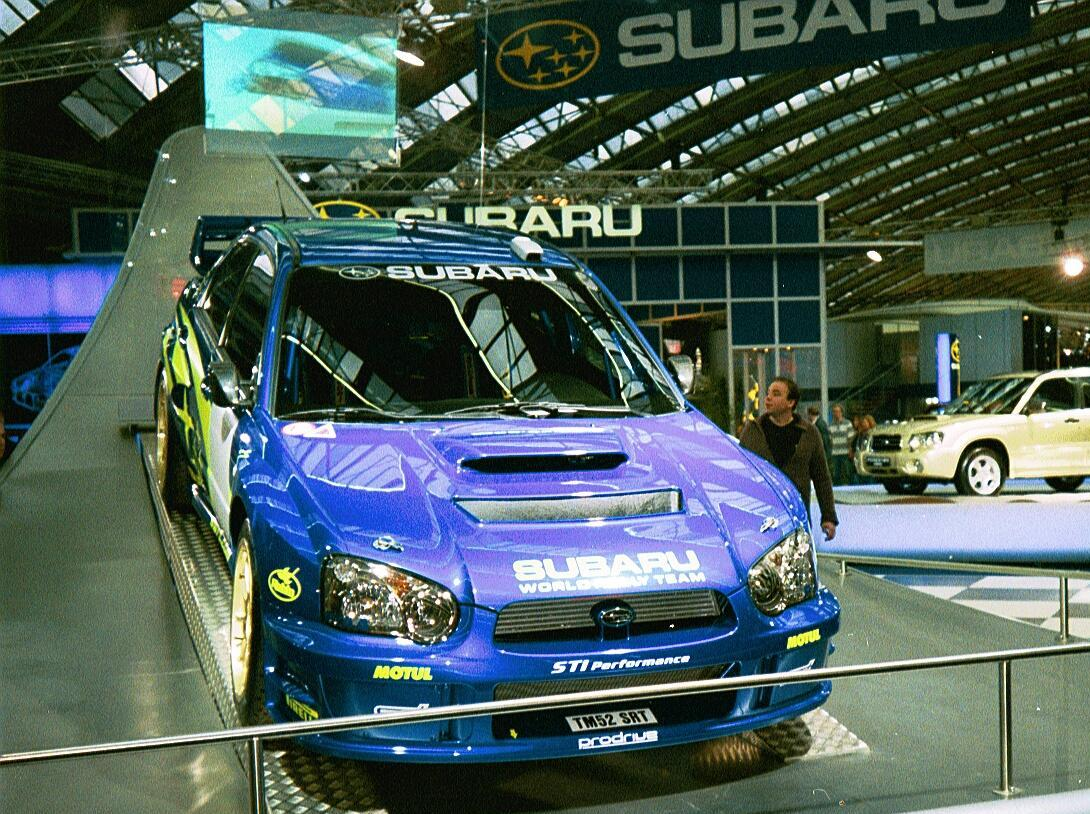 Subaru-stand op de RAI (Amsterdam) 2003 Impreza WRC